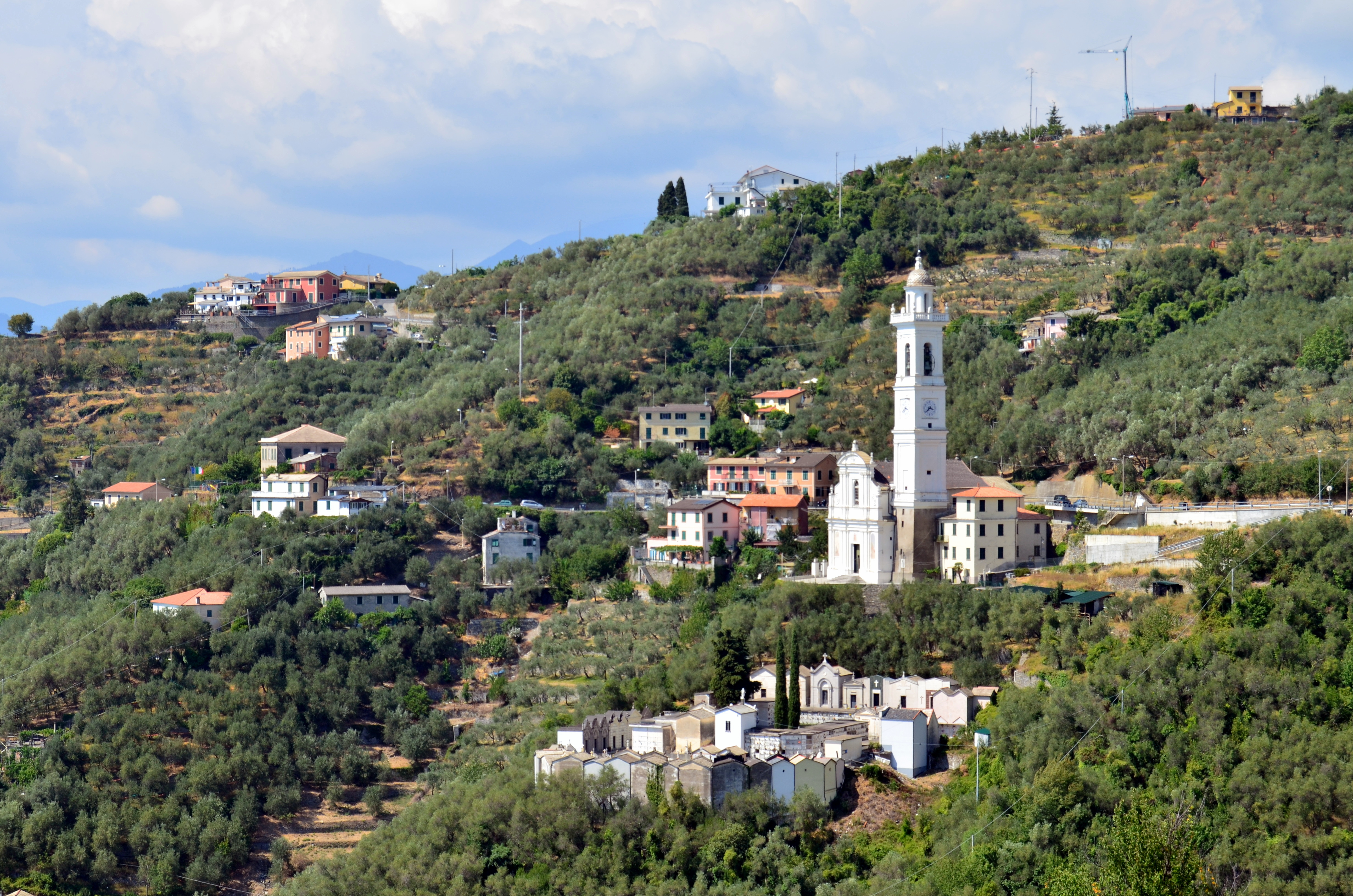 Chiesa di San Lorenzo, Cogorno, Liguria, Italy